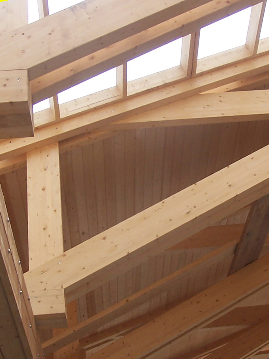 Bakırköy ido iskele binası çatı makaslarından detay